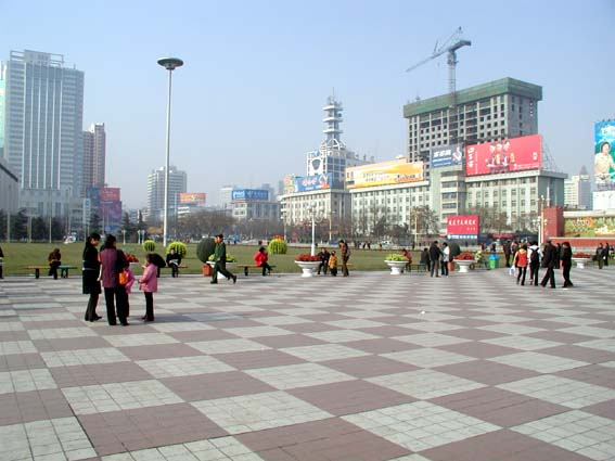 Lanzhou Dongfanghong Square